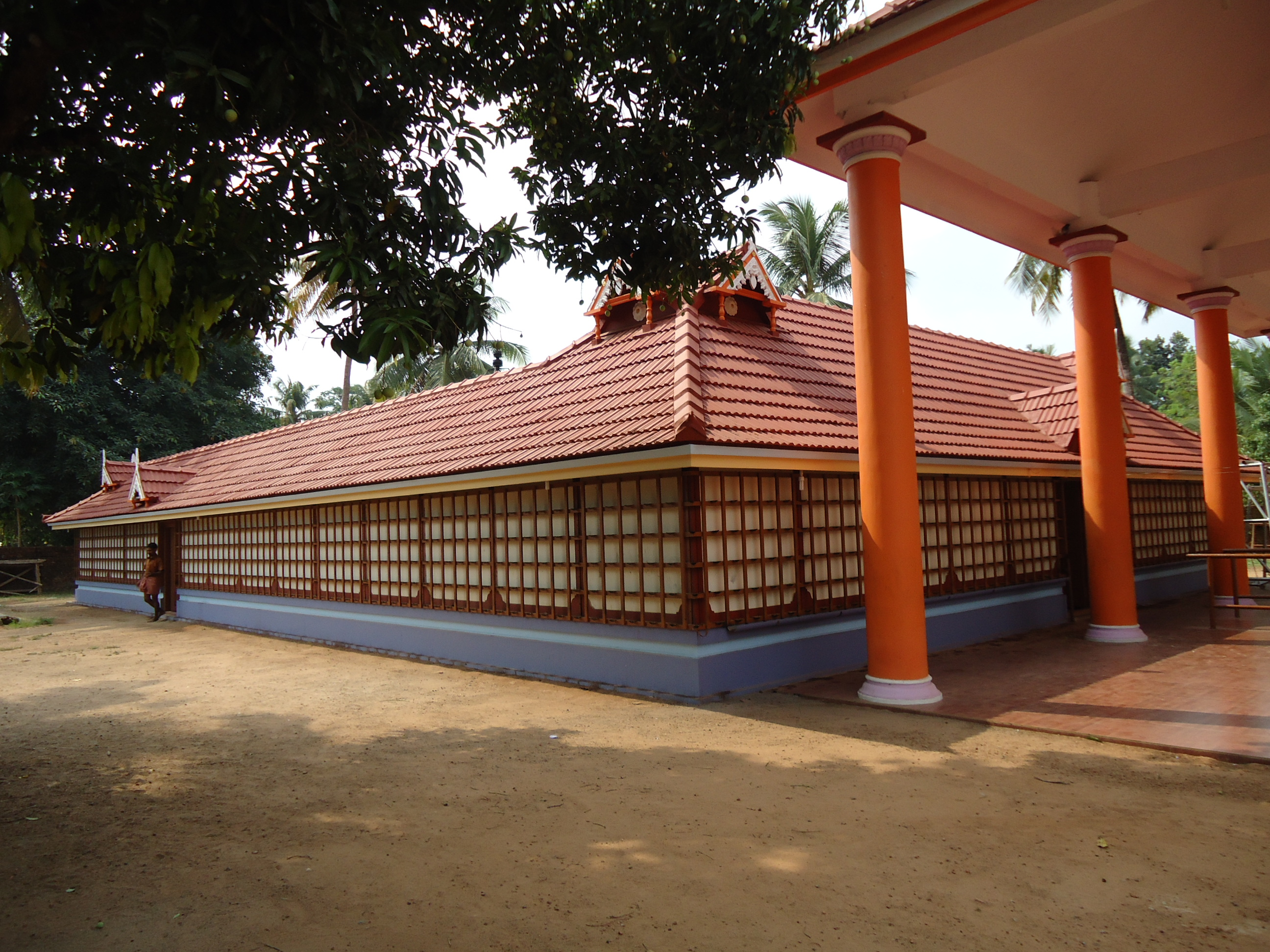 Sree Kurumbakkavu Bhagavathi Temple Poykkattussery Side View